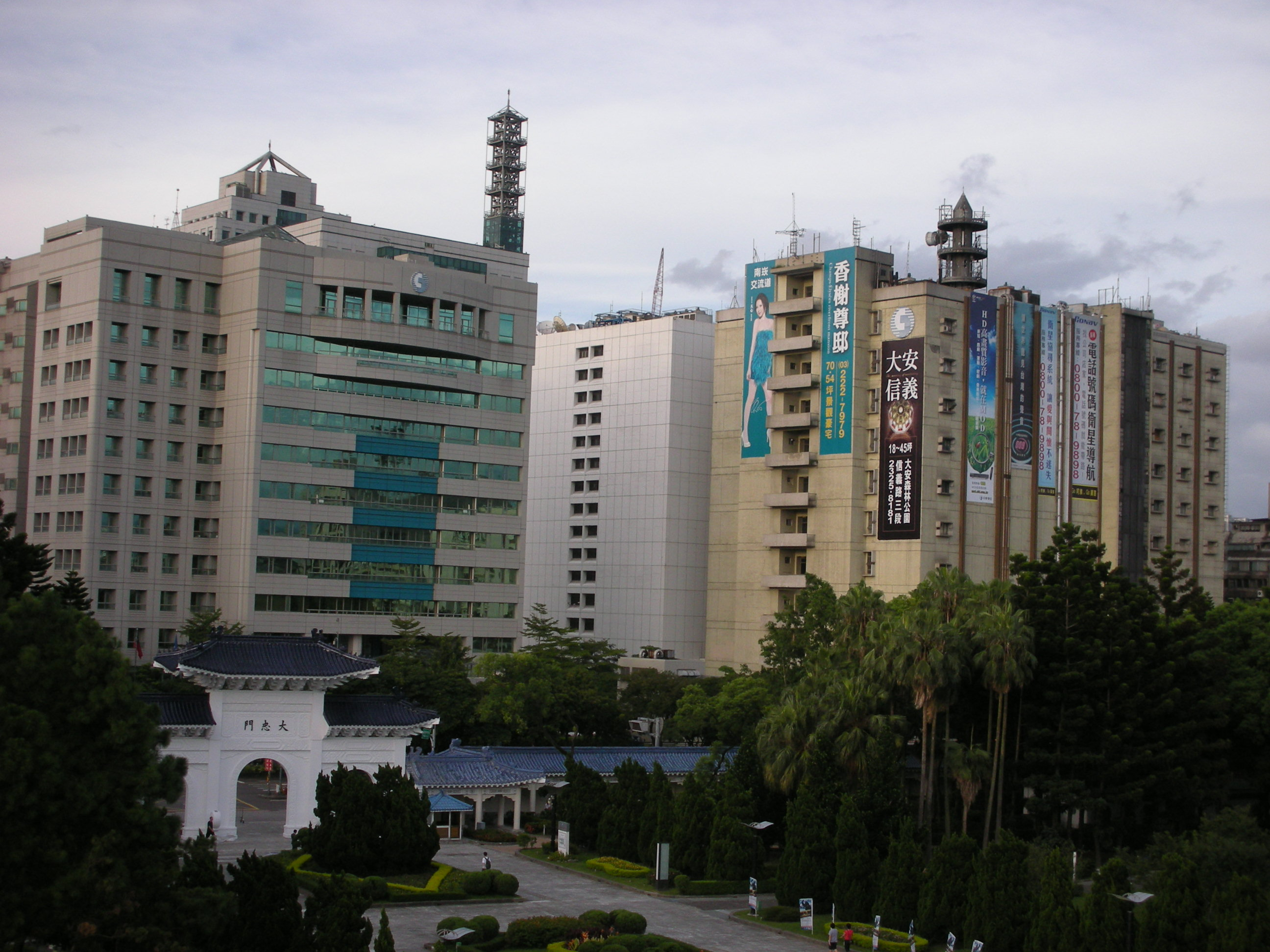 中華電信總部，位於臺北市中正區信義路一段21之3號。